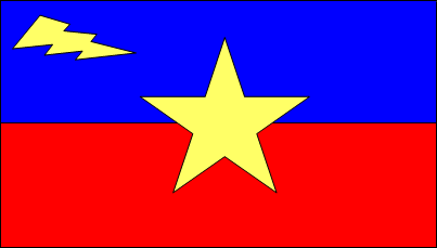 Bandera del municipio Santa Rita, Estado Zulia, Venezuela